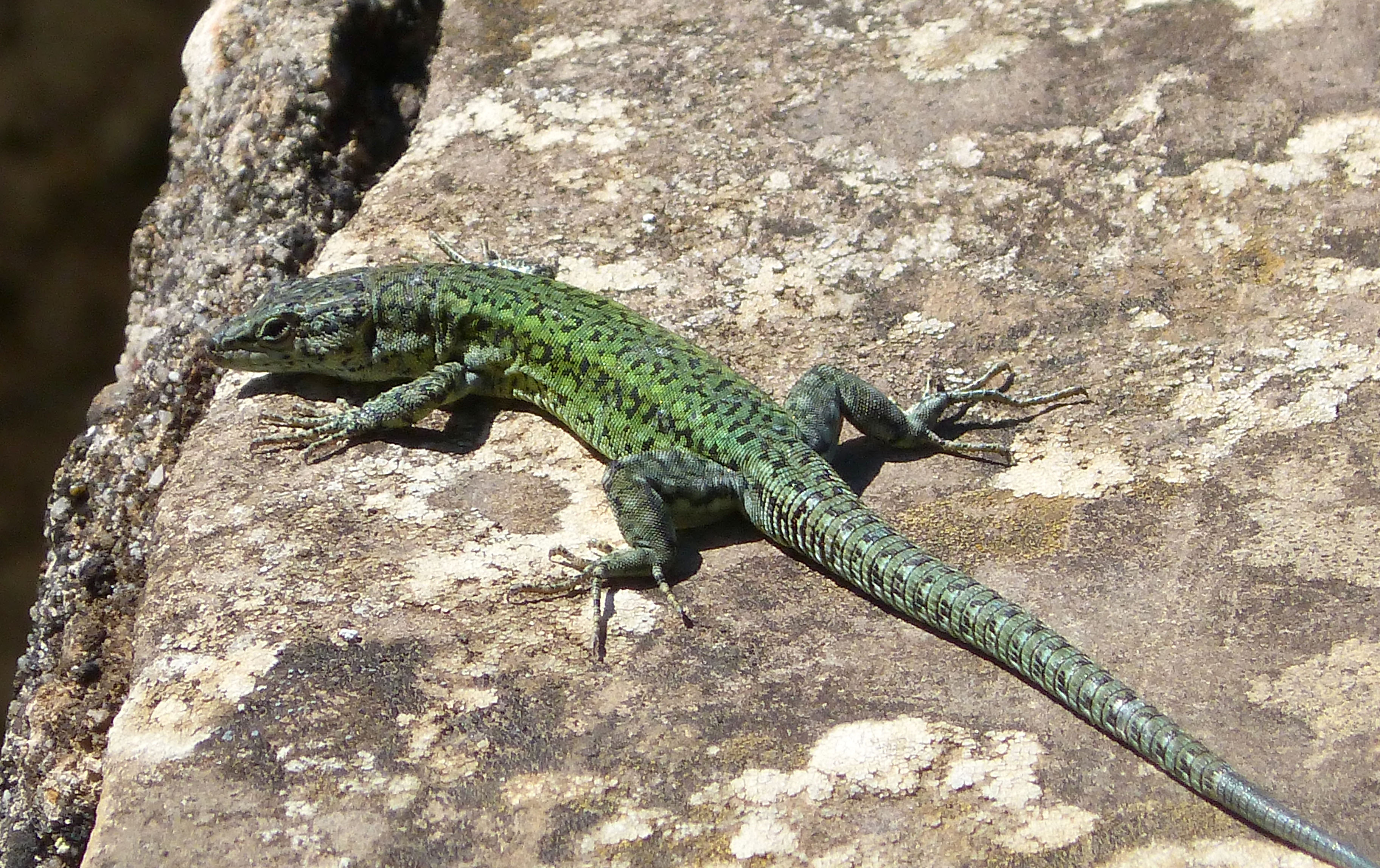 Jimena, Andalucia, Spain